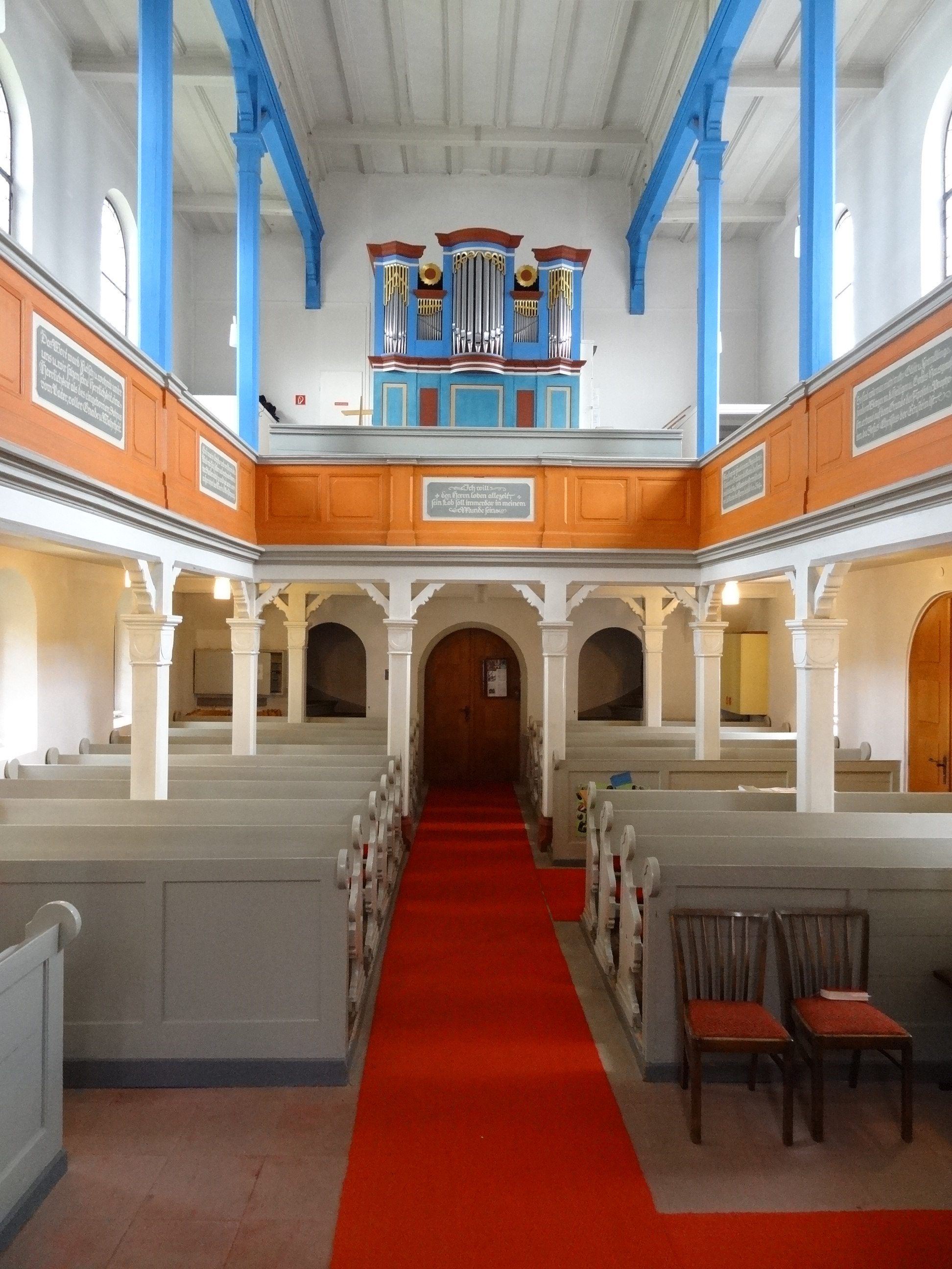 Evangelische Kirche Borsdorf